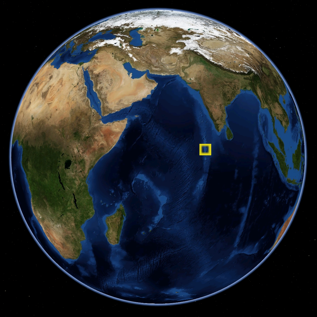 Malediven